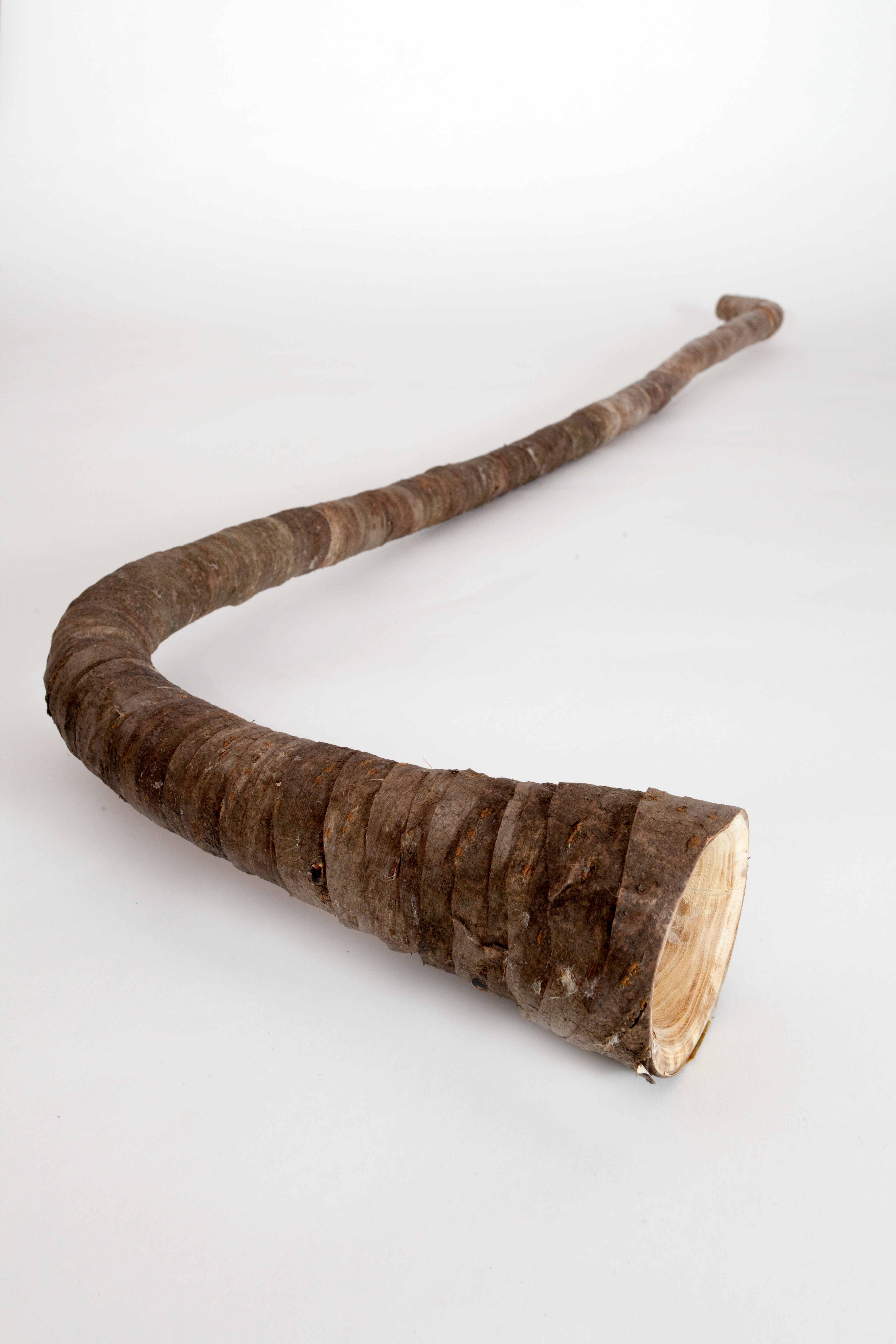 Lesni rog, lastnik fotografije: Jože Setničar.